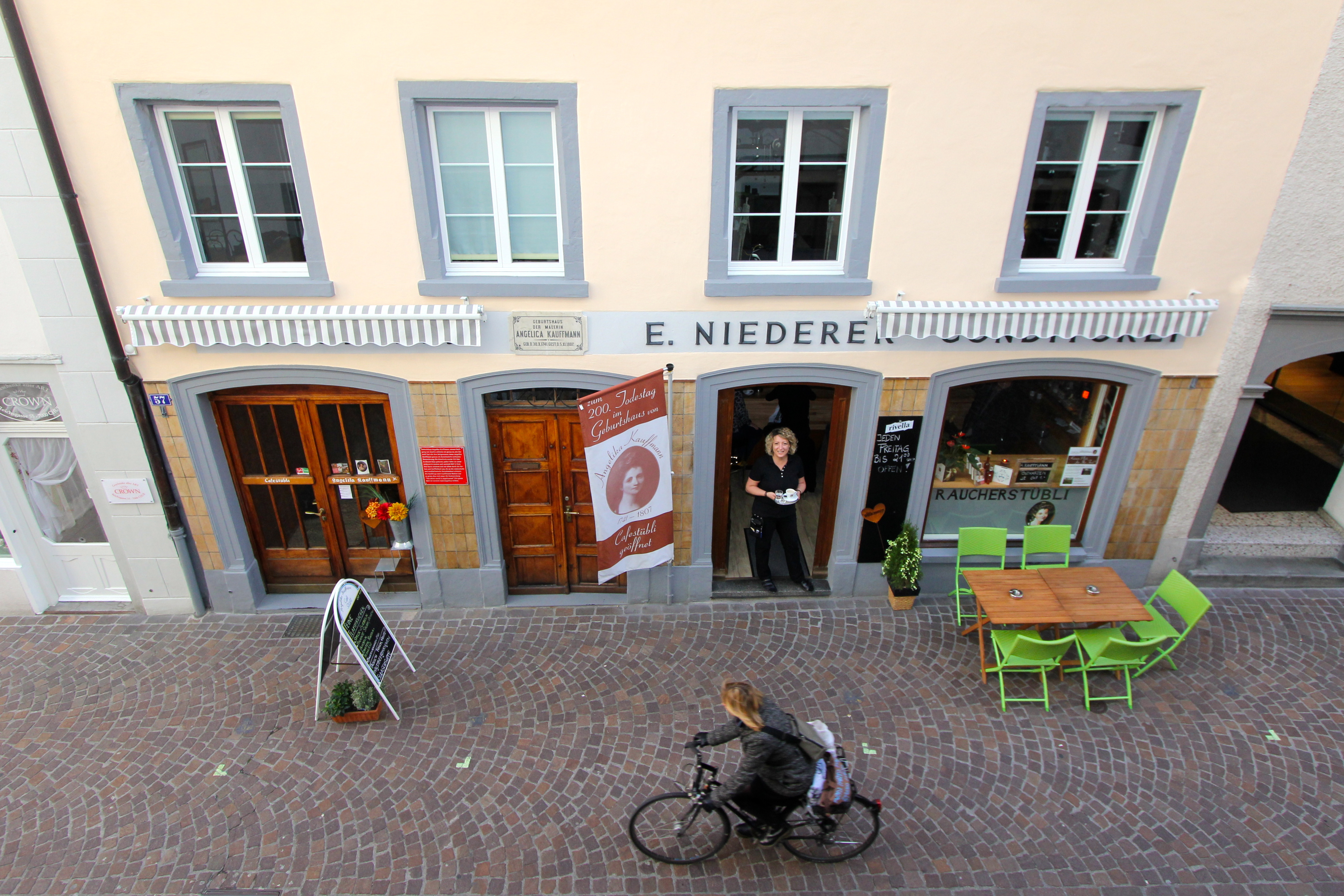 Das Caféstübli Angelika Kauffmann in der Churer Altstadt. Dank umsichtiger Renovation konnte der Charme des liebevoll eingerichteten Stüblis (Gaststube) erhalten werden. Das Zimmer, in dem Angelika Kauffmann geboren wurde, liegt im ersten Stock.